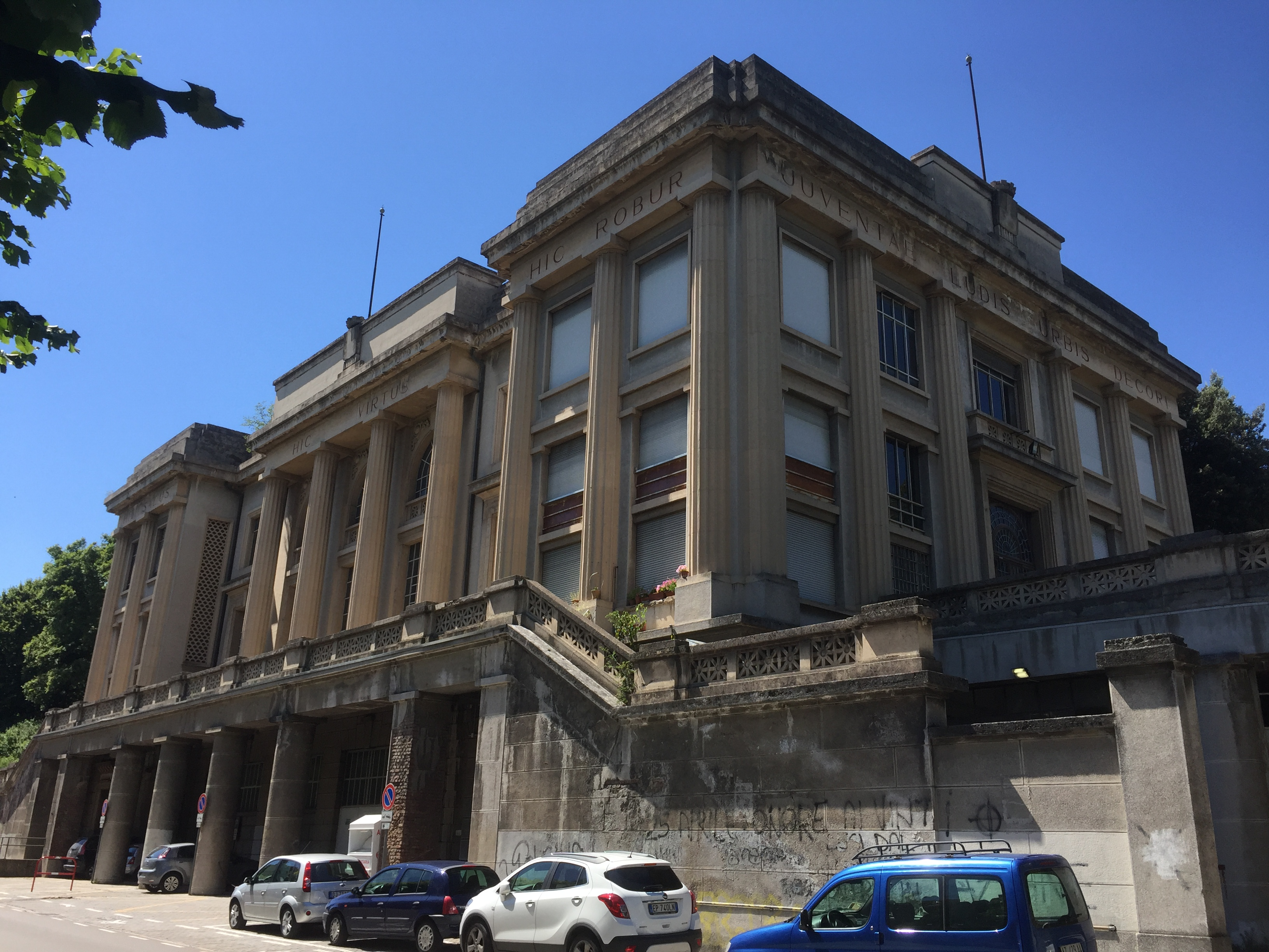 La palestra di viale XXV Aprile in Varese (IT)